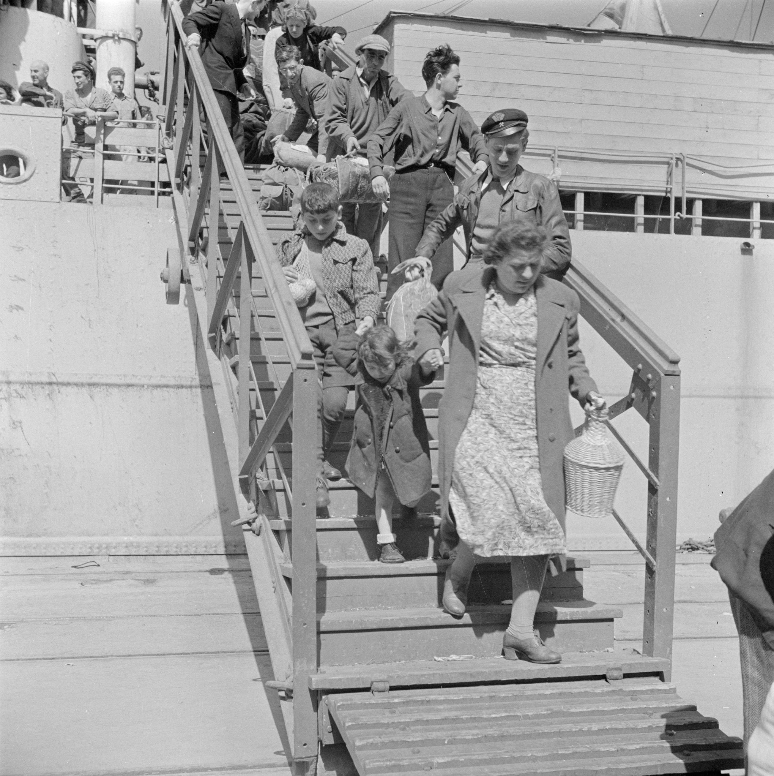 Collectie / Archief : Fotocollectie Van de Poll Reportage / Serie : Israel 1948-1949 Beschrijving : Ontschepen van emigranten (oliem) uit Bulgarije van het transportschip Bulgaria in de haven van Haifa Datum : 1948 Locatie : Haifa, Israël Trefwoorden : emigranten, havens, kinderen, ontschepingen, scheepvaart, vervoermiddelen Fotograaf : Poll, Willem van de, [onbekend] Auteursrechthebbende : Nationaal Archief Materiaalsoort : Negatief (zwart/wit) Nummer archiefinventaris : bekijk toegang 2.24.14.02 Bestanddeelnummer : 255-1141